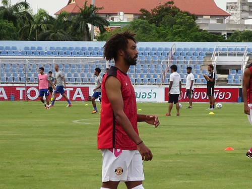 Isaka Cernak